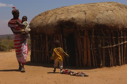 Famille - documentaire Umoja, le village interdit aux hommes de Jean Crousillac et Jean-Marc Sainclair.